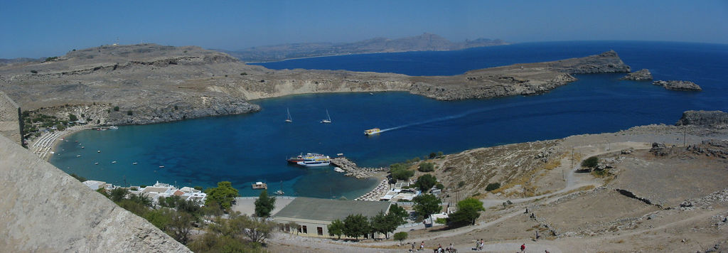 Panorámica de la ciudad de Lindos (Rodas)